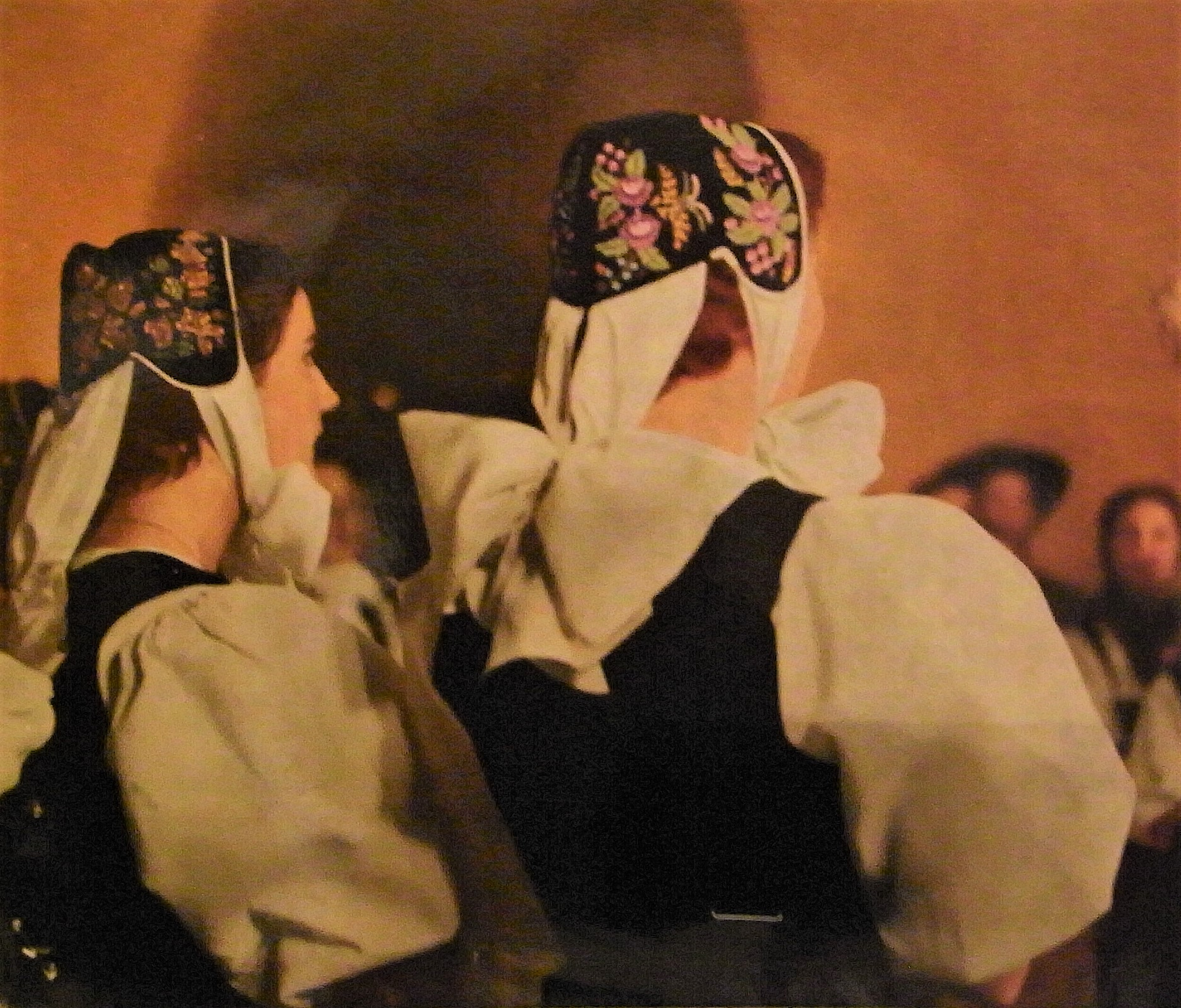 Diairi porté par des chanteuses du groupe folklorique le Diairi